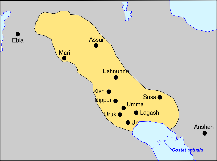 Extension de l'Empèri d'Akkad a son apogèu durant la segonda mitat dau sègle XXIII avC.